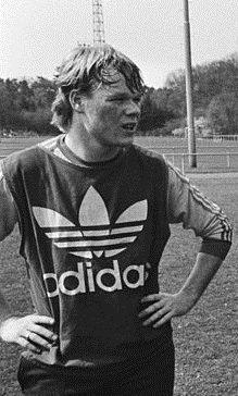 Entraînement de l'équipe néerlandaise de football à Zeist. Ronald Koeman. Photographie par R.C. Croes / Anefo.